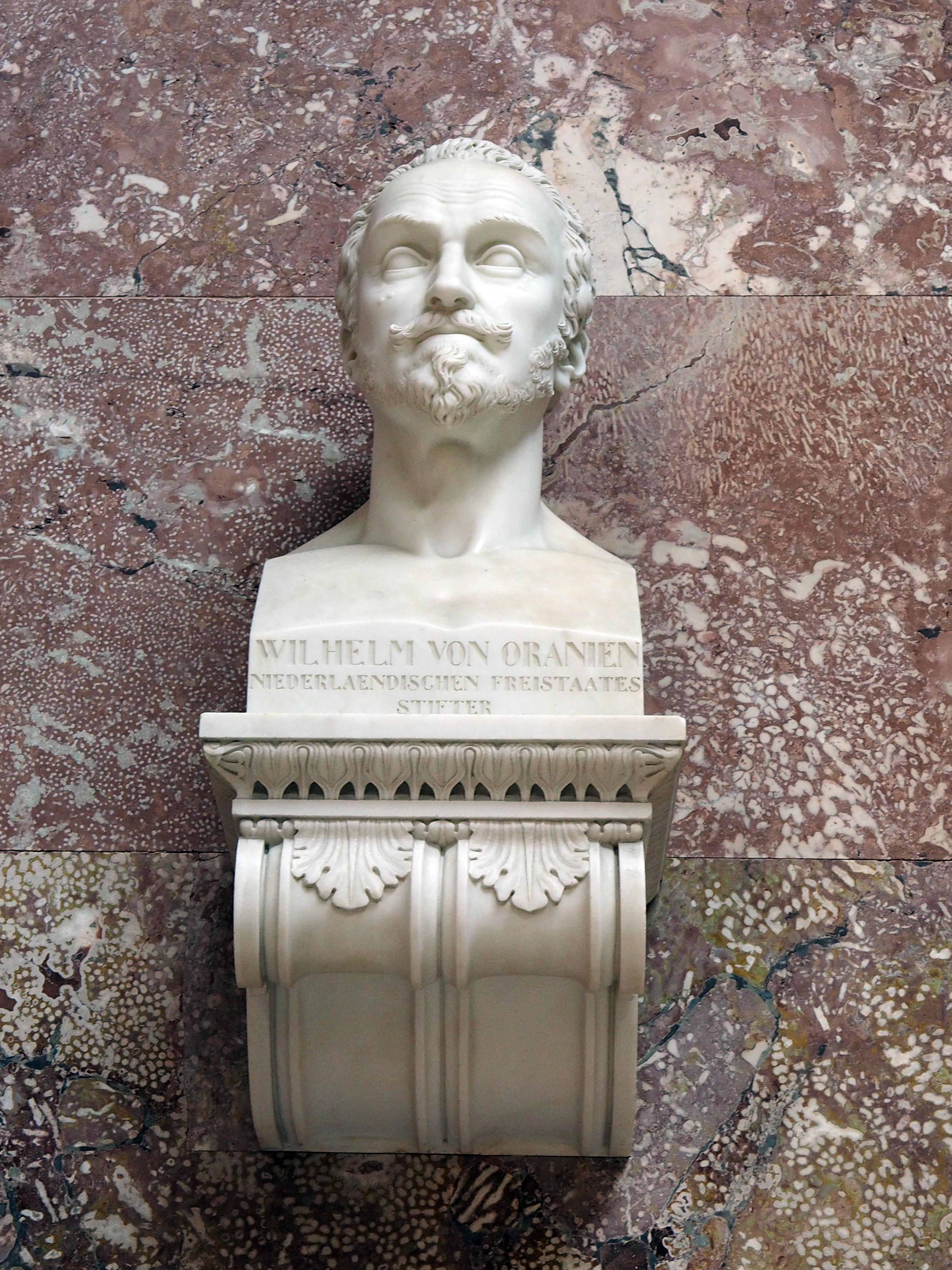 Büste Wilhelm von Oranien, Bildhauer Christian Friedrich Tieck (1815) in der Walhalla bei Regensburg